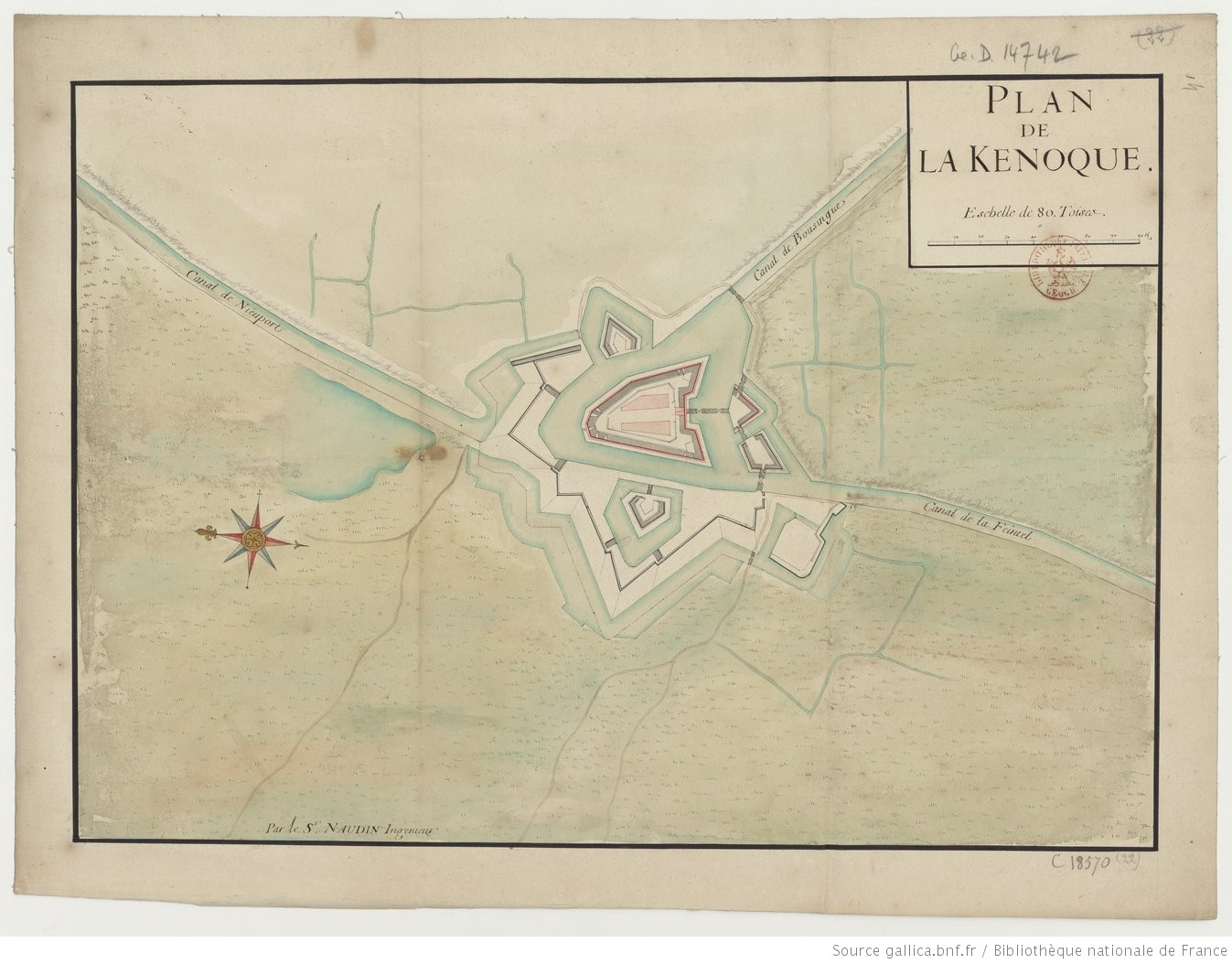 cartes réalisées par Naudin sur Gallica.